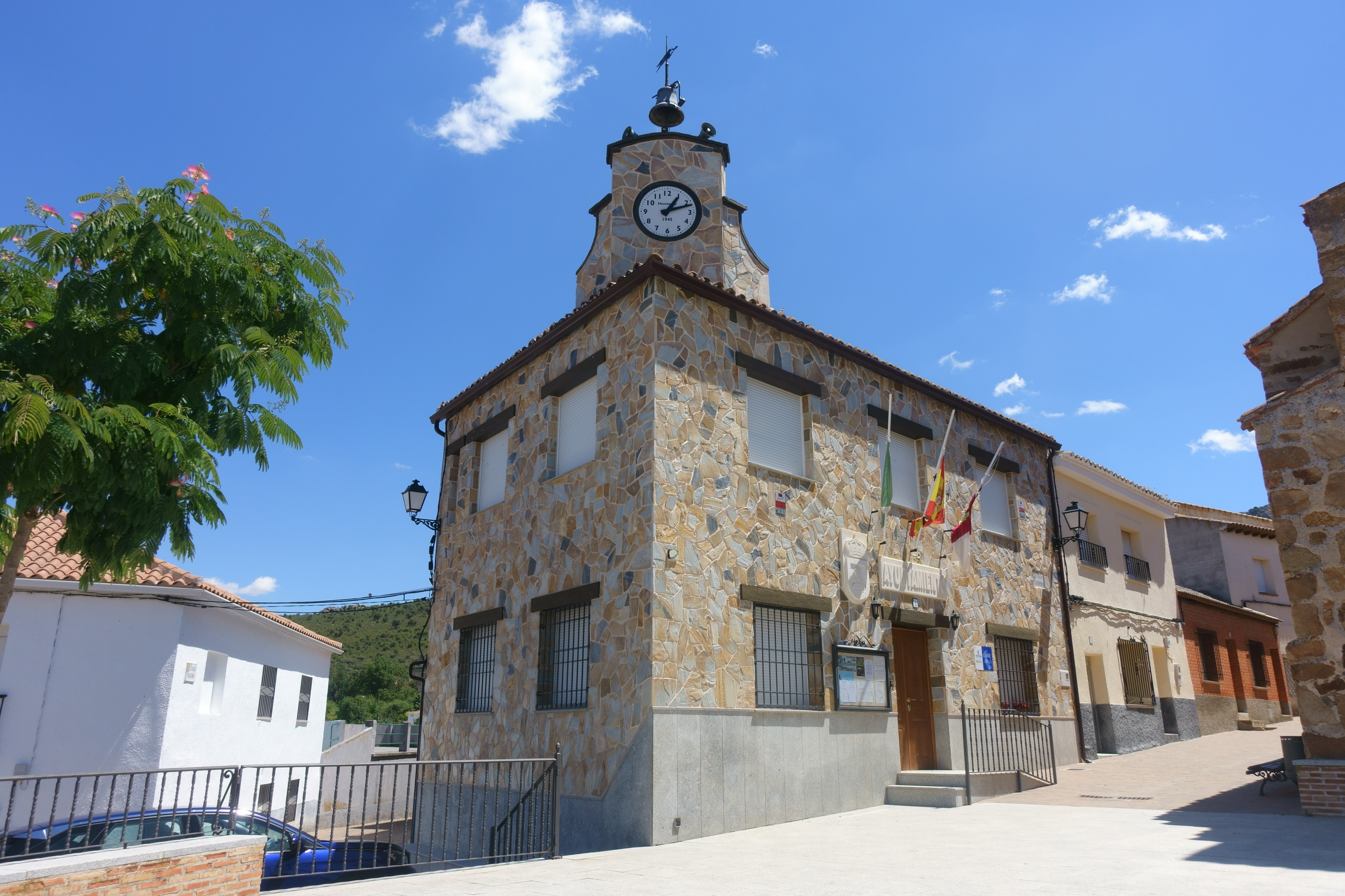 Casa consistorial de Hontanar (Toledo, España).